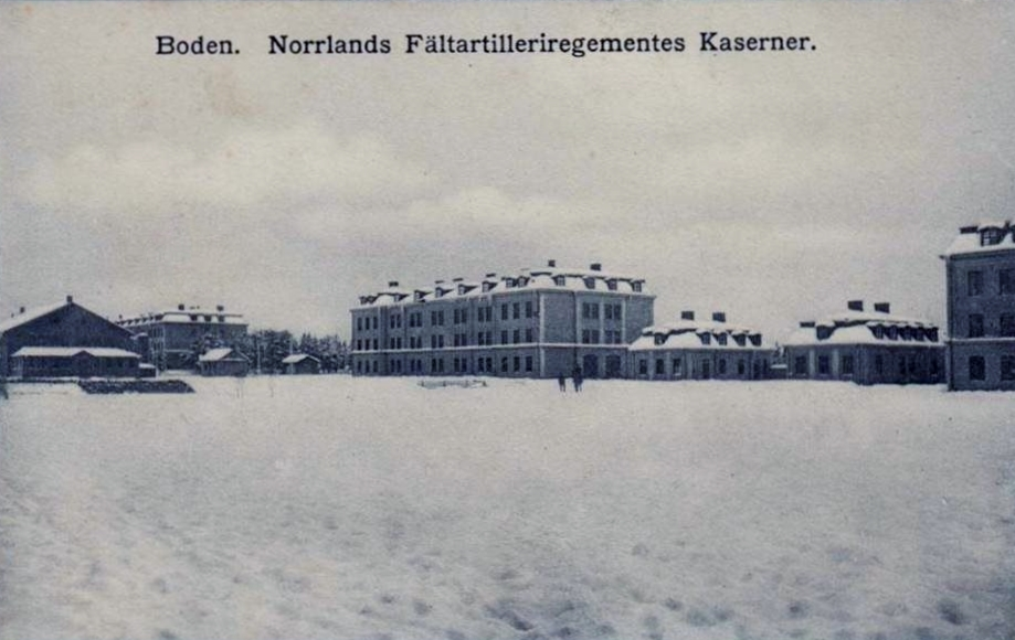 Vy över kaserngården samt kaserner vid Norrlands artilleriregementes detachement i Boden. Från 1928 var Norrbottens artillerikår förlagda till kasernerna, från 1954 Norrlands signalkår, och från 2005 Artilleriregementet (A 9). Kasernen längst bort i vänster är Östra kasernen vid Norrbottens regemente.